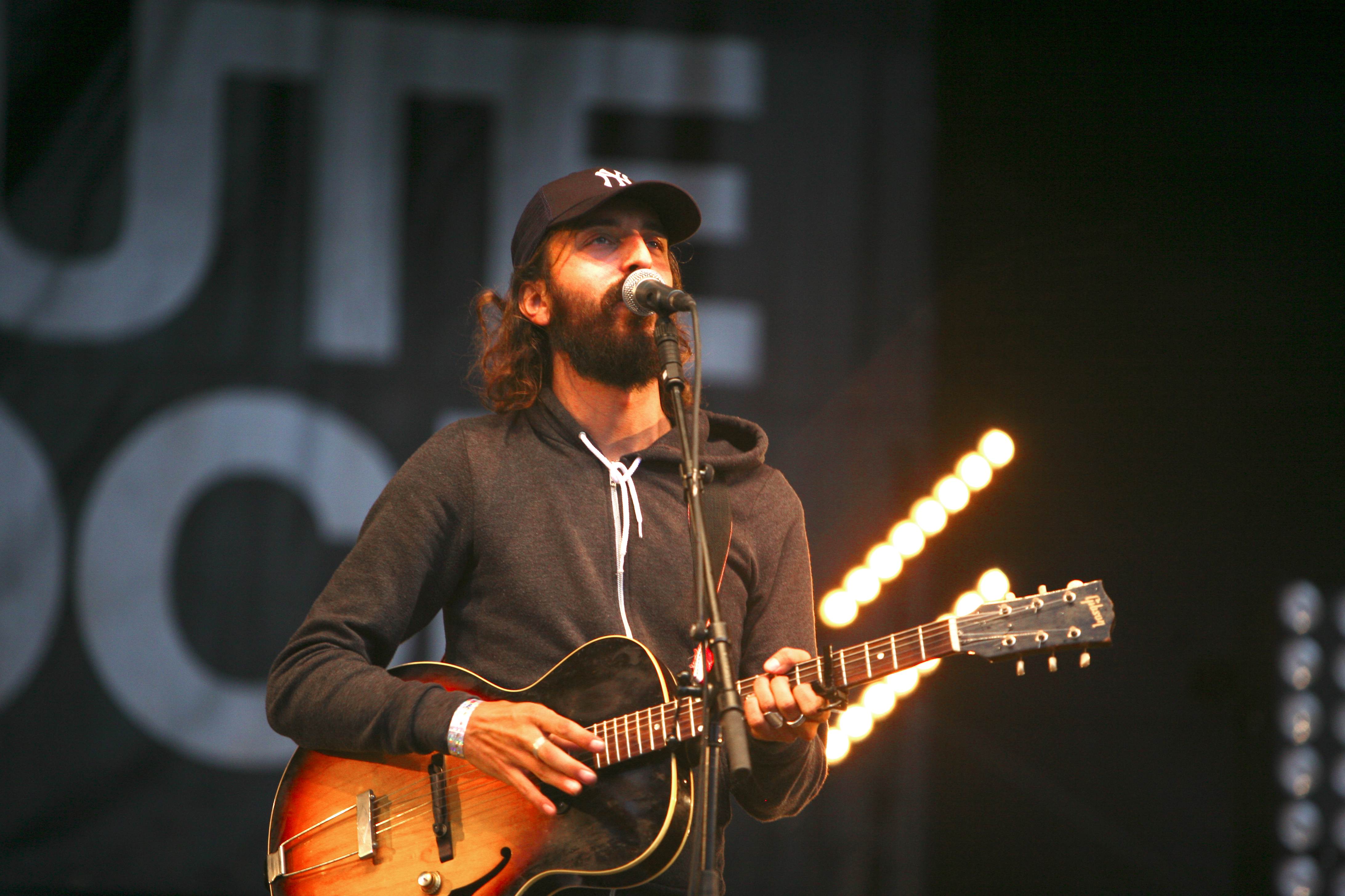 David-Ivar Herman Düne (Herman Düne) at Route du Rock, August 2007